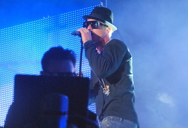 Niclas Petersen under Nik & Jay-koncert på Vig Festival 2010.